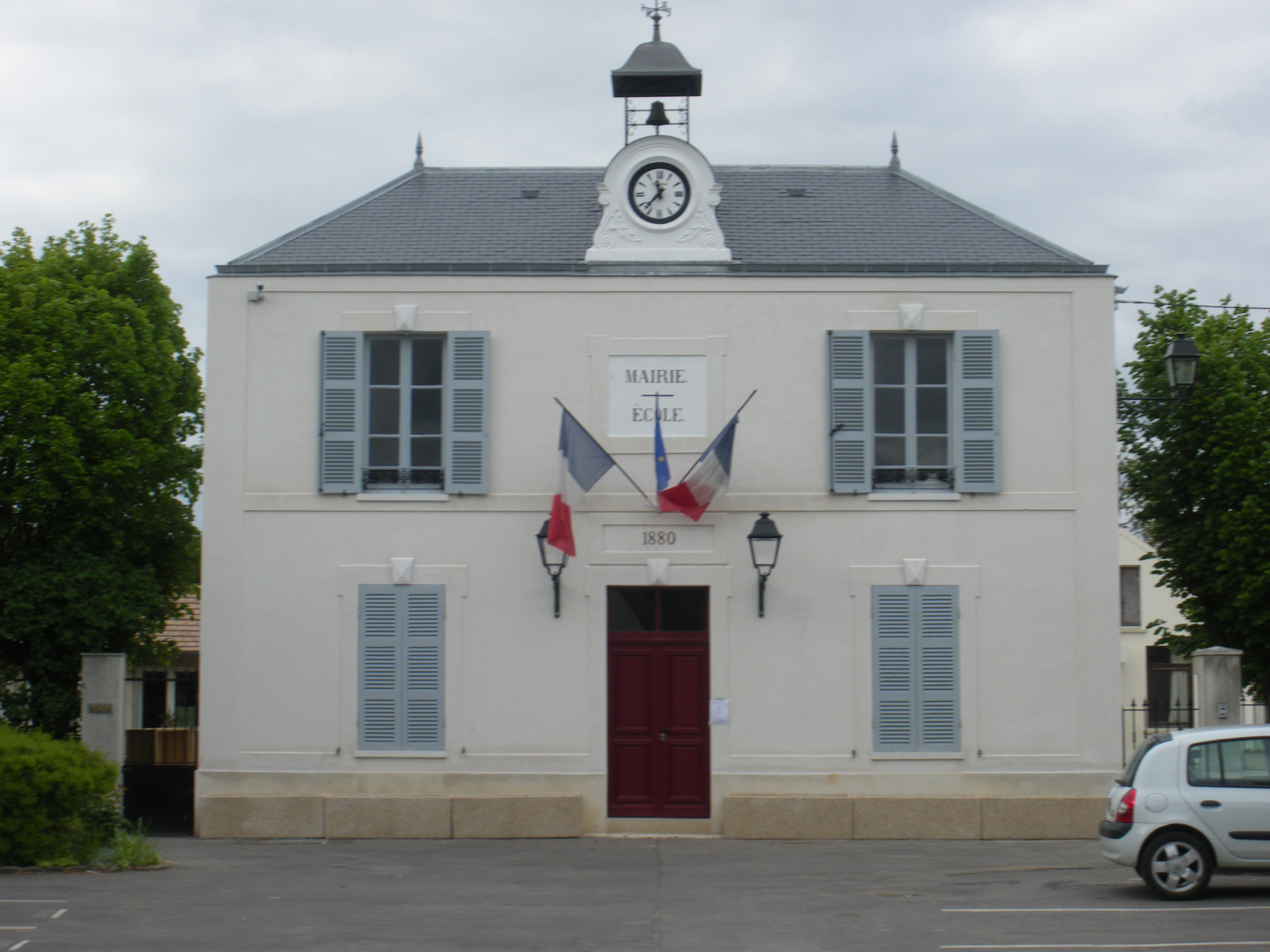 Mairie de Courson, Essonne, France